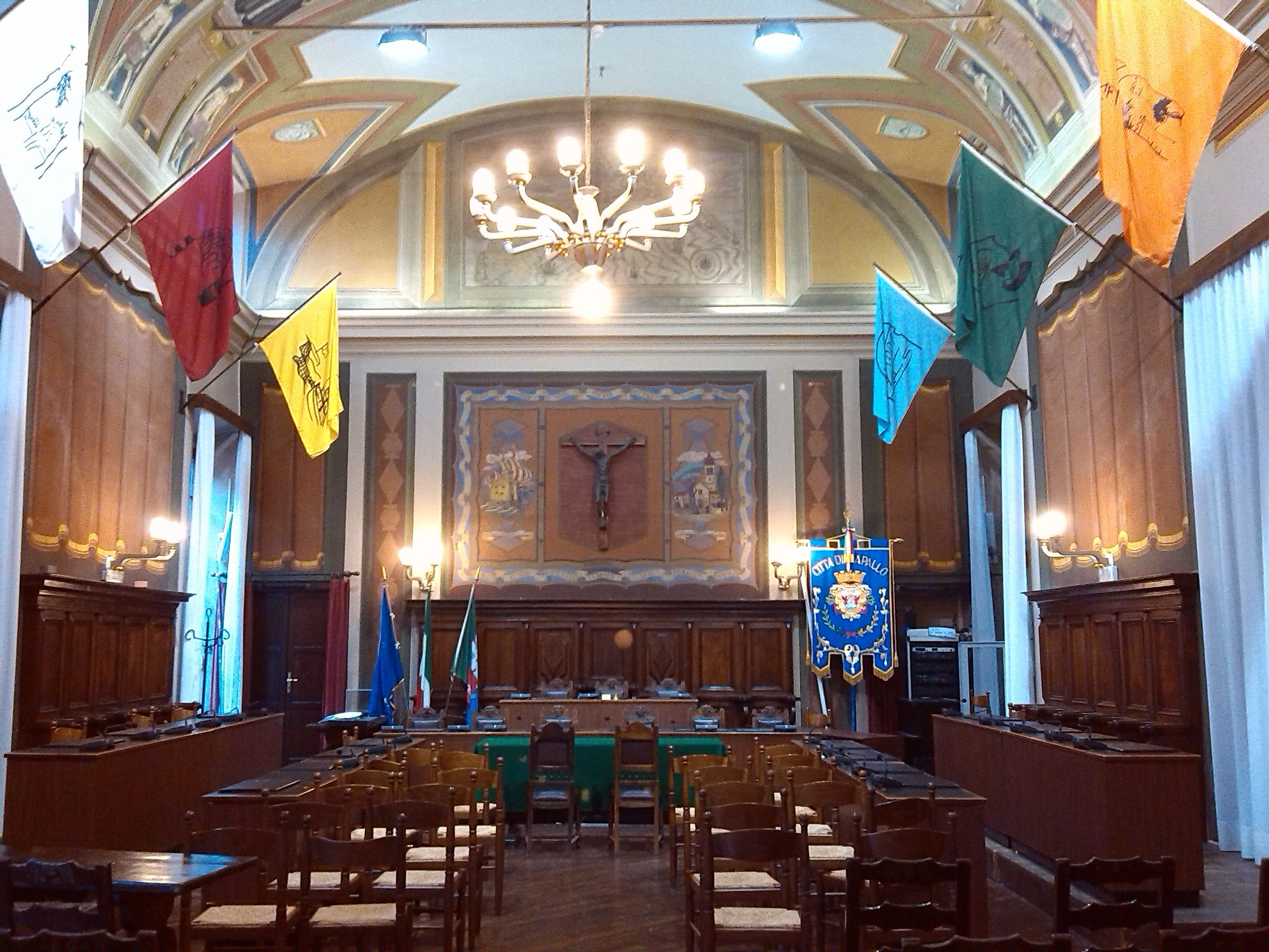 La sala del Consiglio Comunale di Rapallo, Liguria, Italia